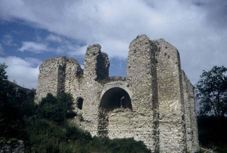 vue du château